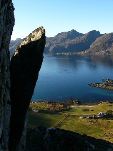 Nappstraumen, picture taken from Vestvågøya towards Flakstadøya